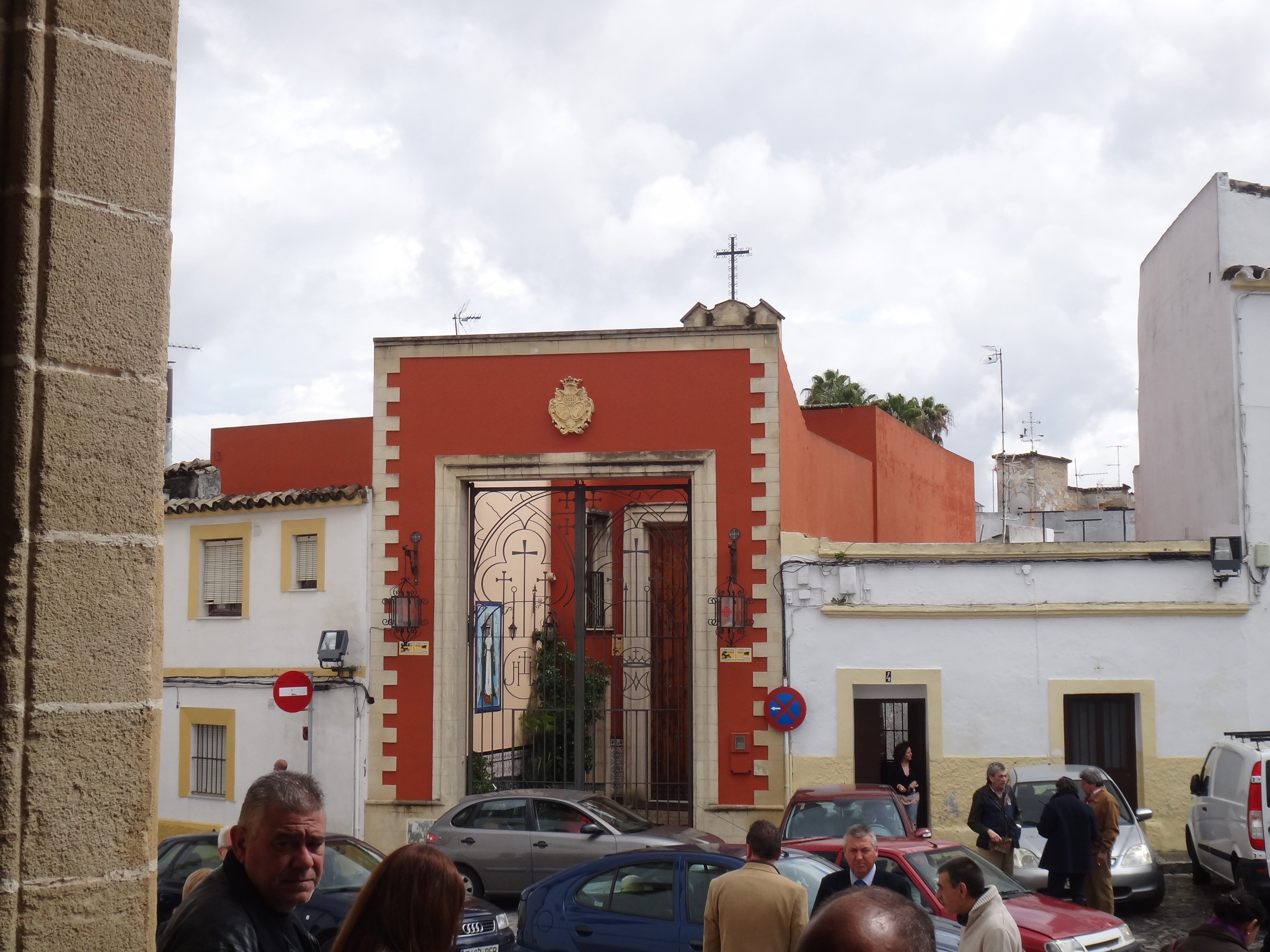 Casa Hermandad Santa Marta - Jerez de la Frontera (Andalucía, España).